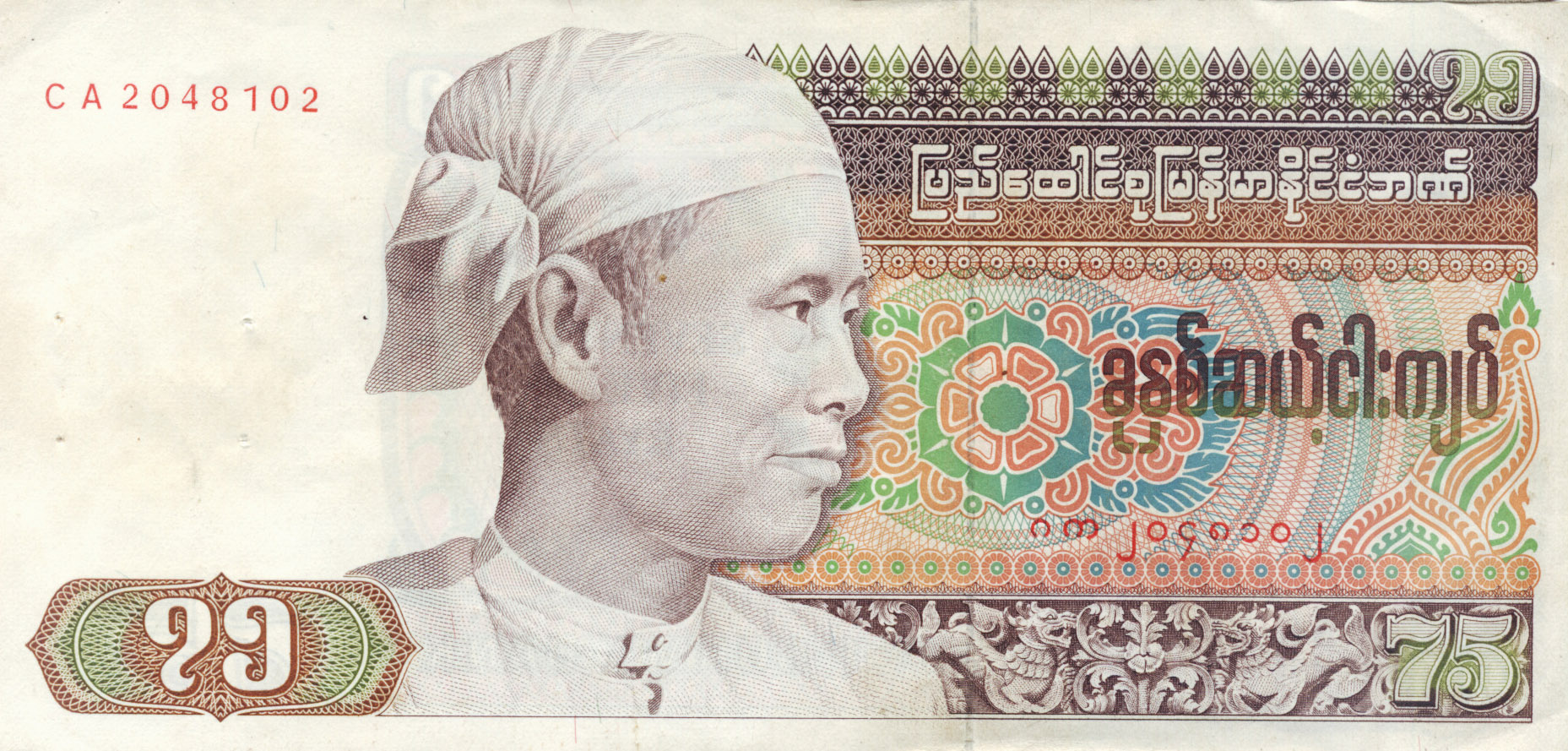 Burma (Myanmar) Kyat// not in use